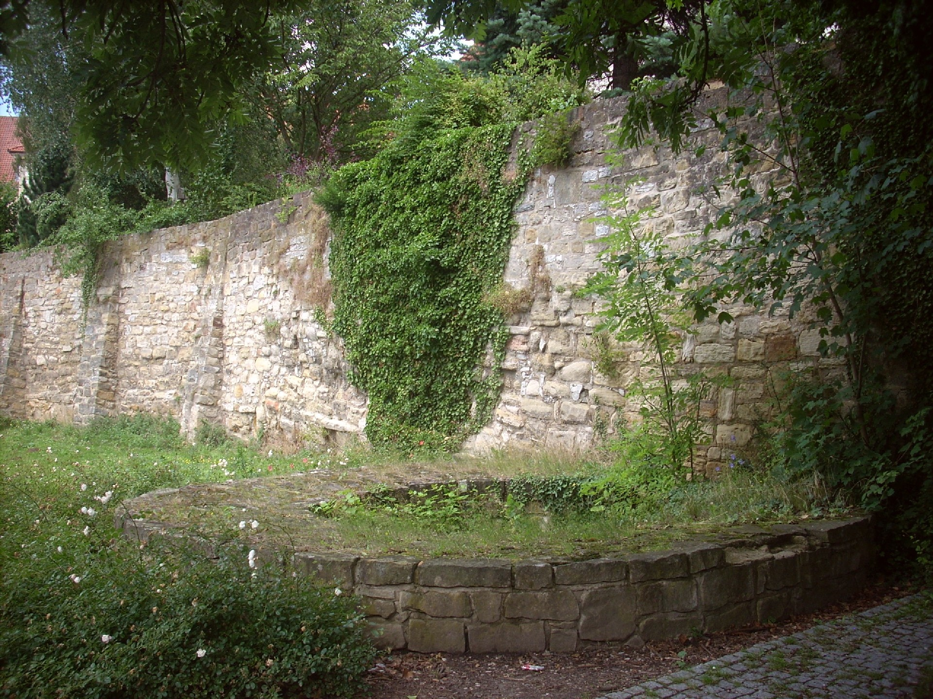 Hildesheim, Domhof, Außenansicht von Südwesten: Rest der Domburgmauer und Fundament eines der Rundtürme Bischof Bernwards (um 1000)